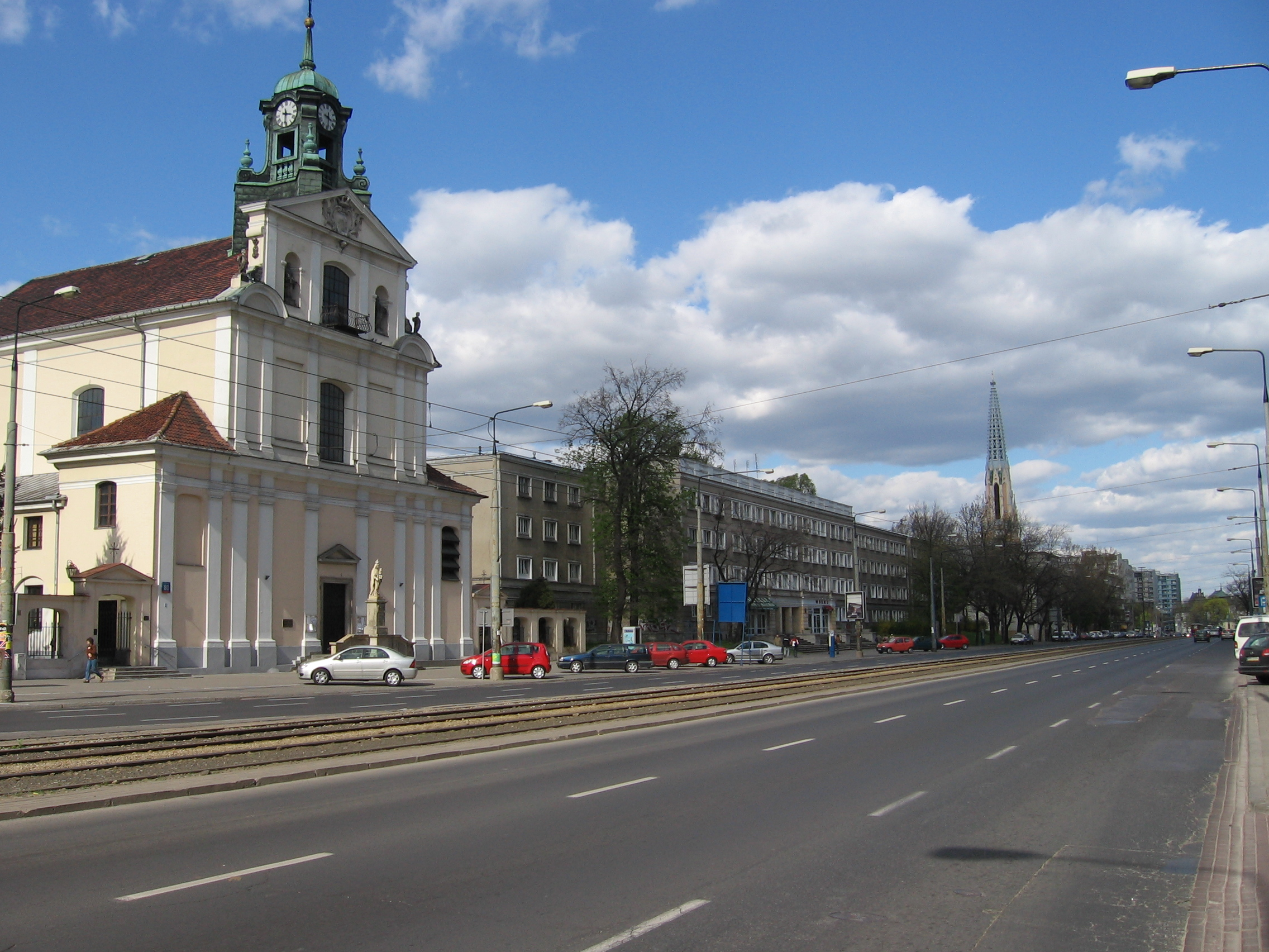 Aleja Solidarności w Warszawie